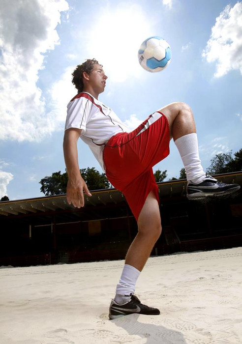 Martijn Bosman